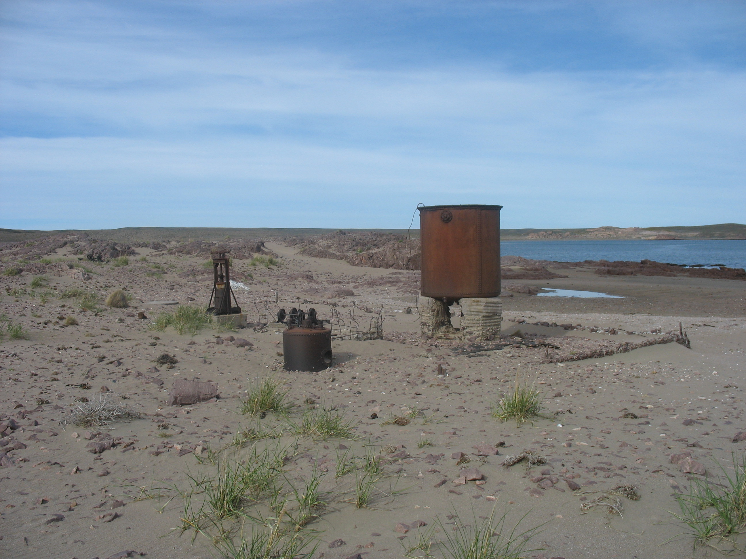 Vista de los restos abandonados de una factoria en isla Lobos (Argentina)